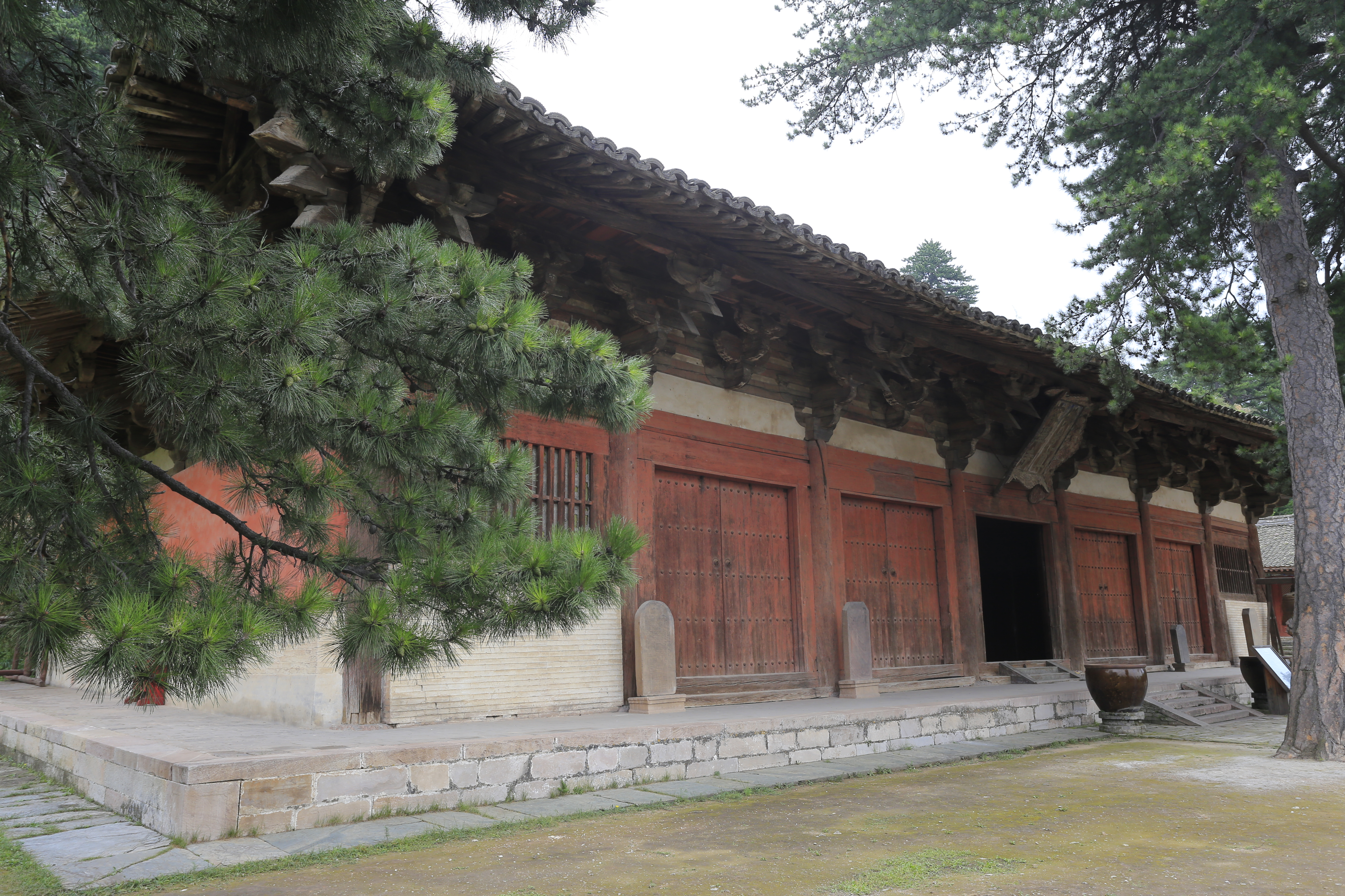 五台佛光寺—— 大殿